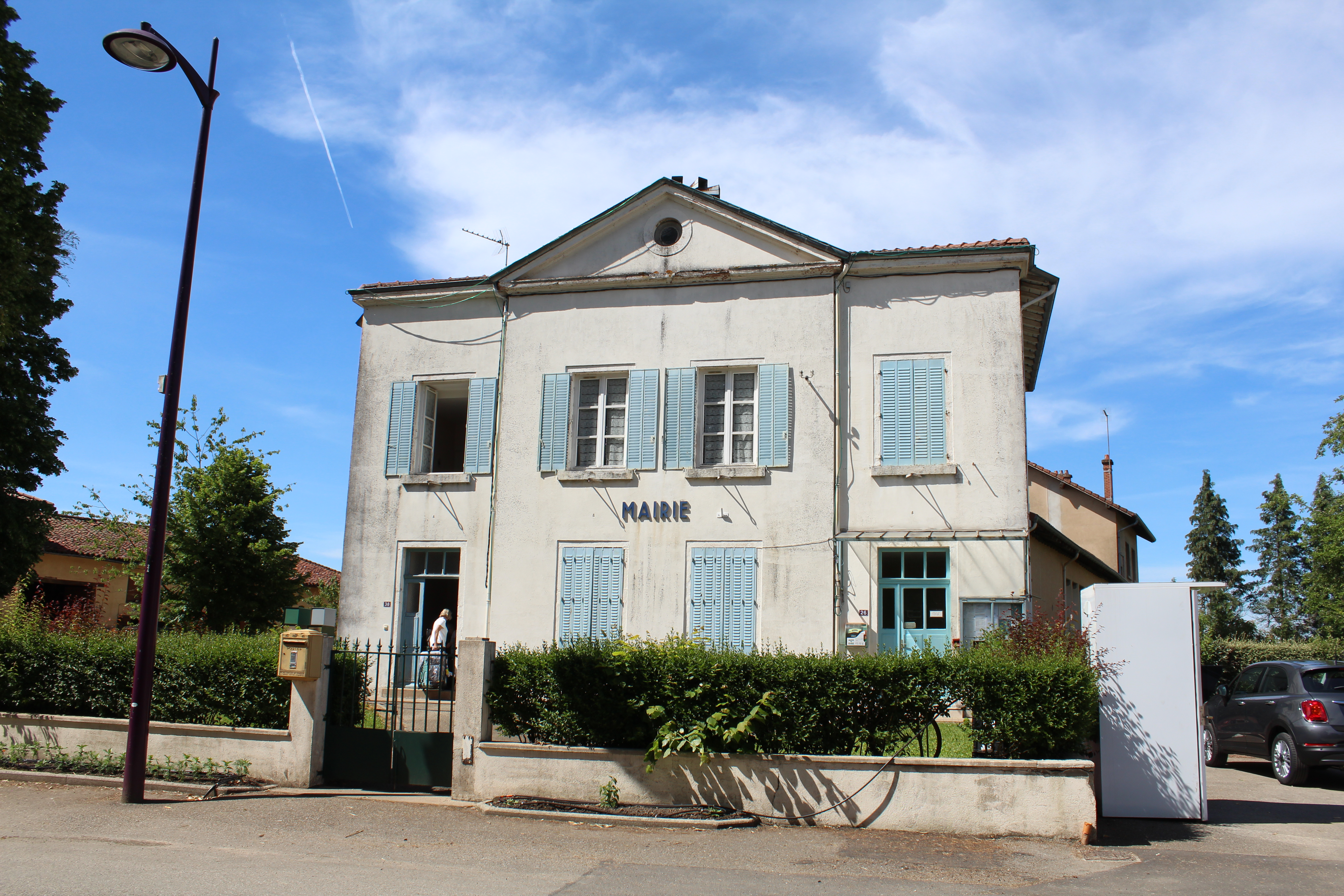 Mairie de Curciat-Dongalon.